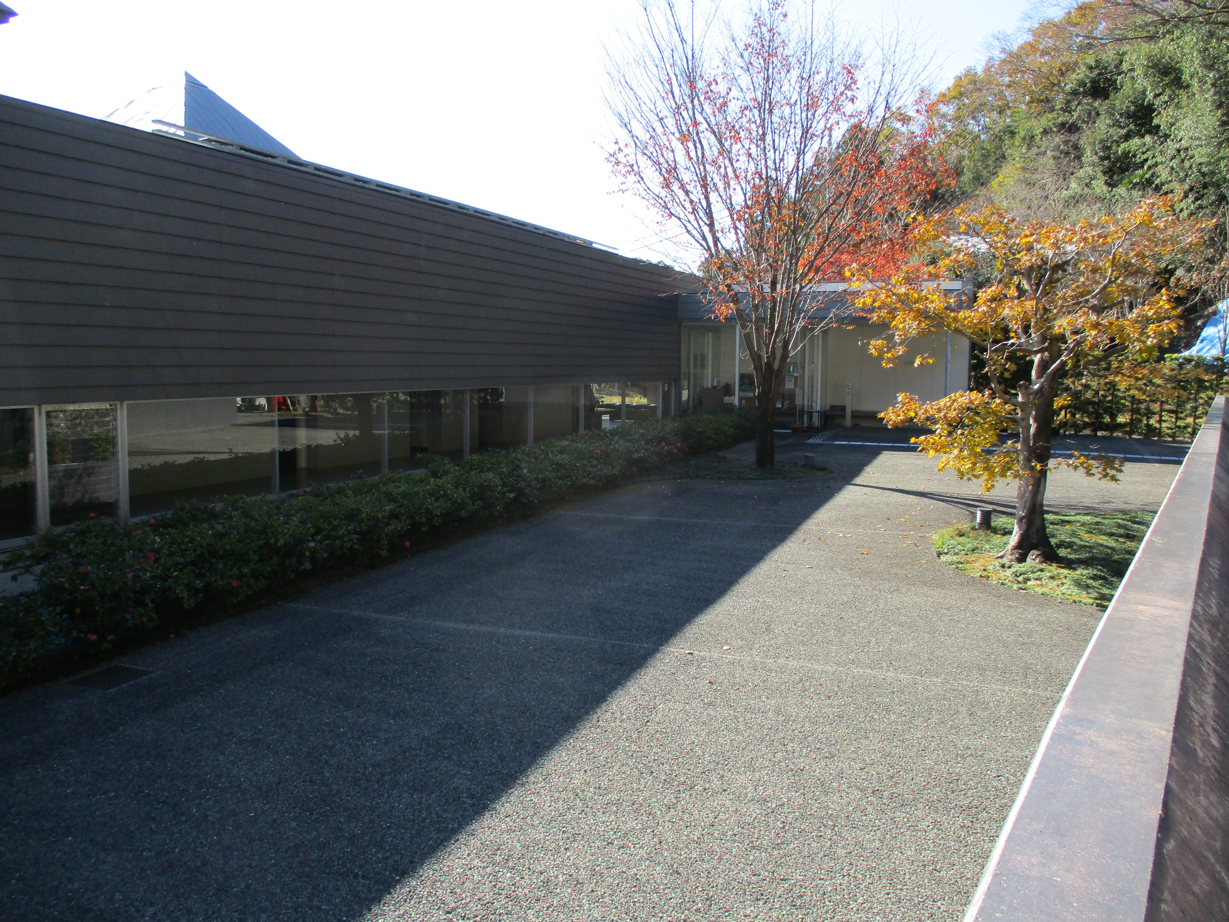 かんなみ仏の里美術館の入り口